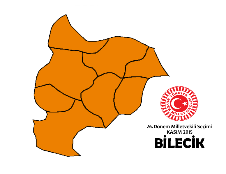 Kasım 2015 seçimleri